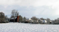 Zelf gemaakt Categorie:Afbeelding winter